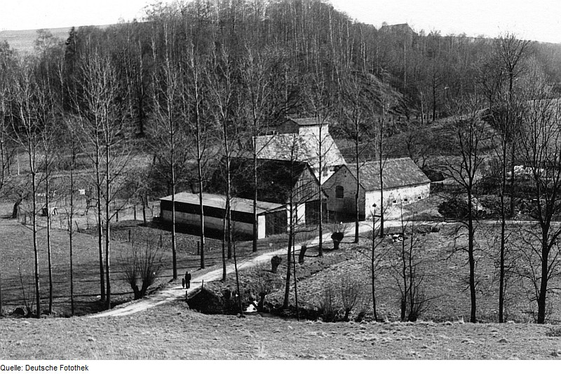 Original image description from the Deutsche FotothekTriebischtal-Kobitzsch. Niedermühle, Rendlermühle oder Fritzschen-Mühle, Ansicht